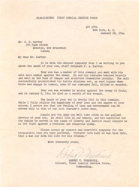 Lettera del colonnello Robert Frederick